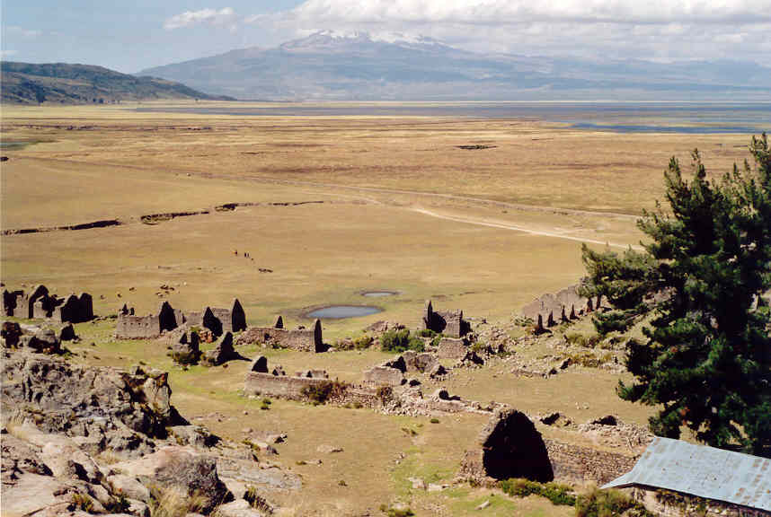 Le volcan Sarasara et le lac parinacochas vus des hauteurs du site incaïque d'Incahuasi